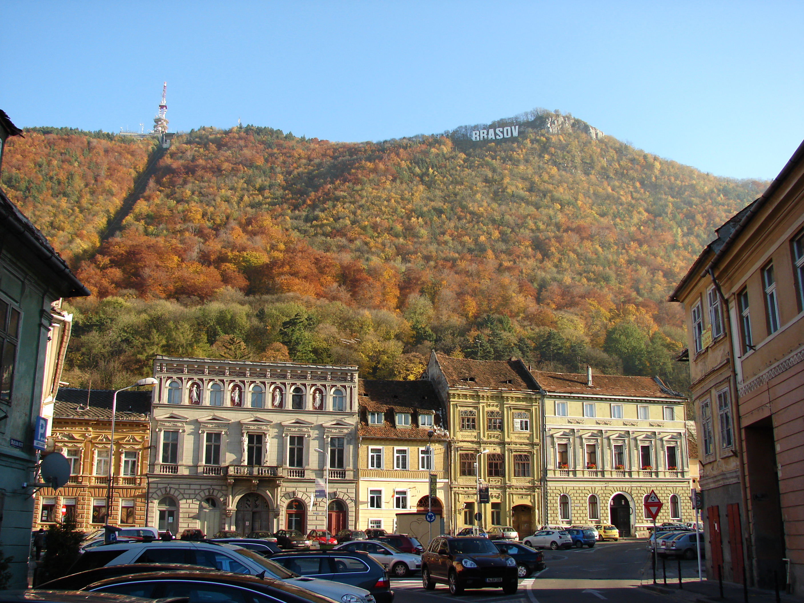 Case din alte vremuri